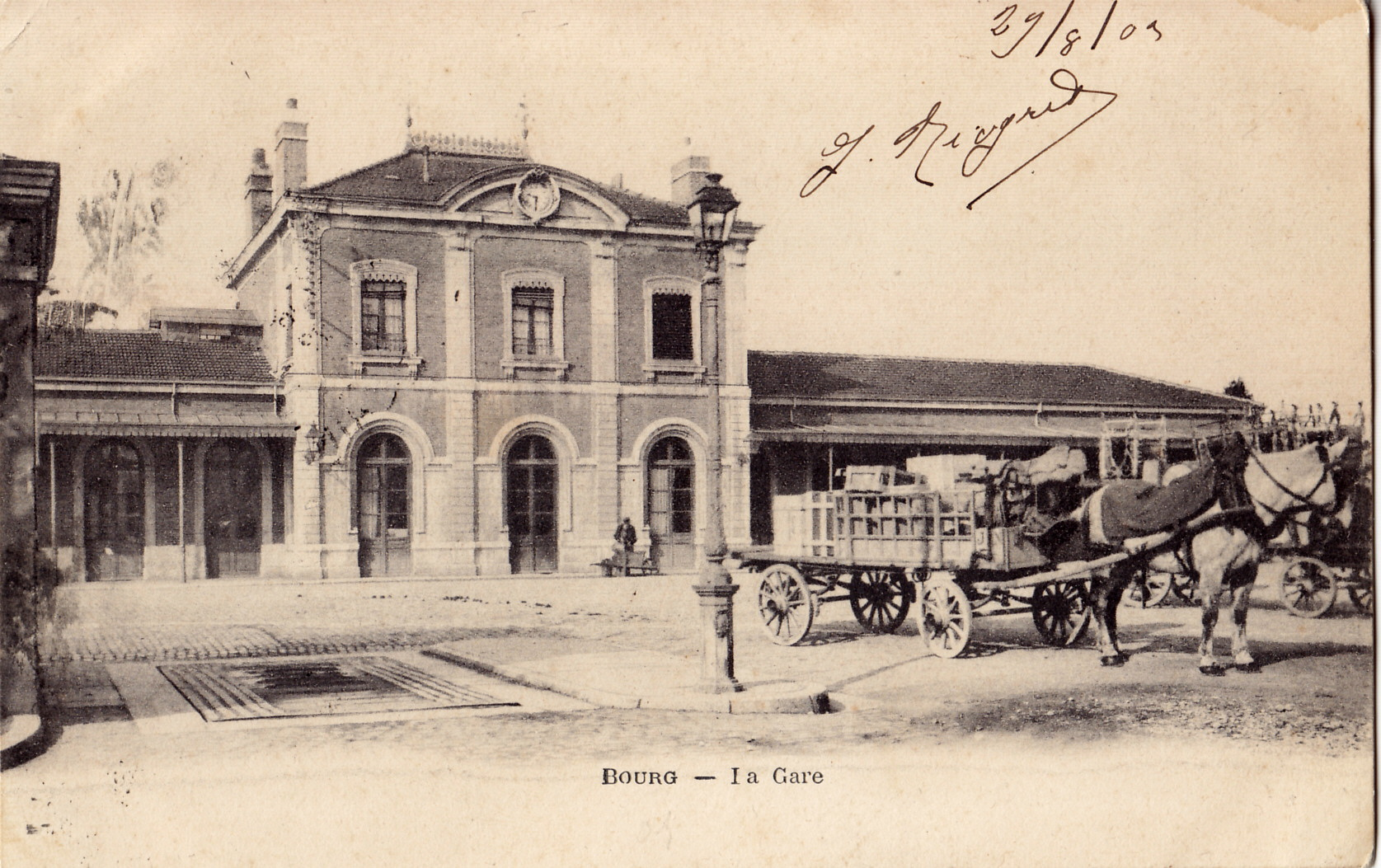 Carte postale ancienne sans mention d'éditeur : BOURG-EN-BRESSE - La Gare.